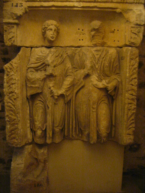 Musée de Sens, Yonne, France : stèle gallo-romaine représentant un couple